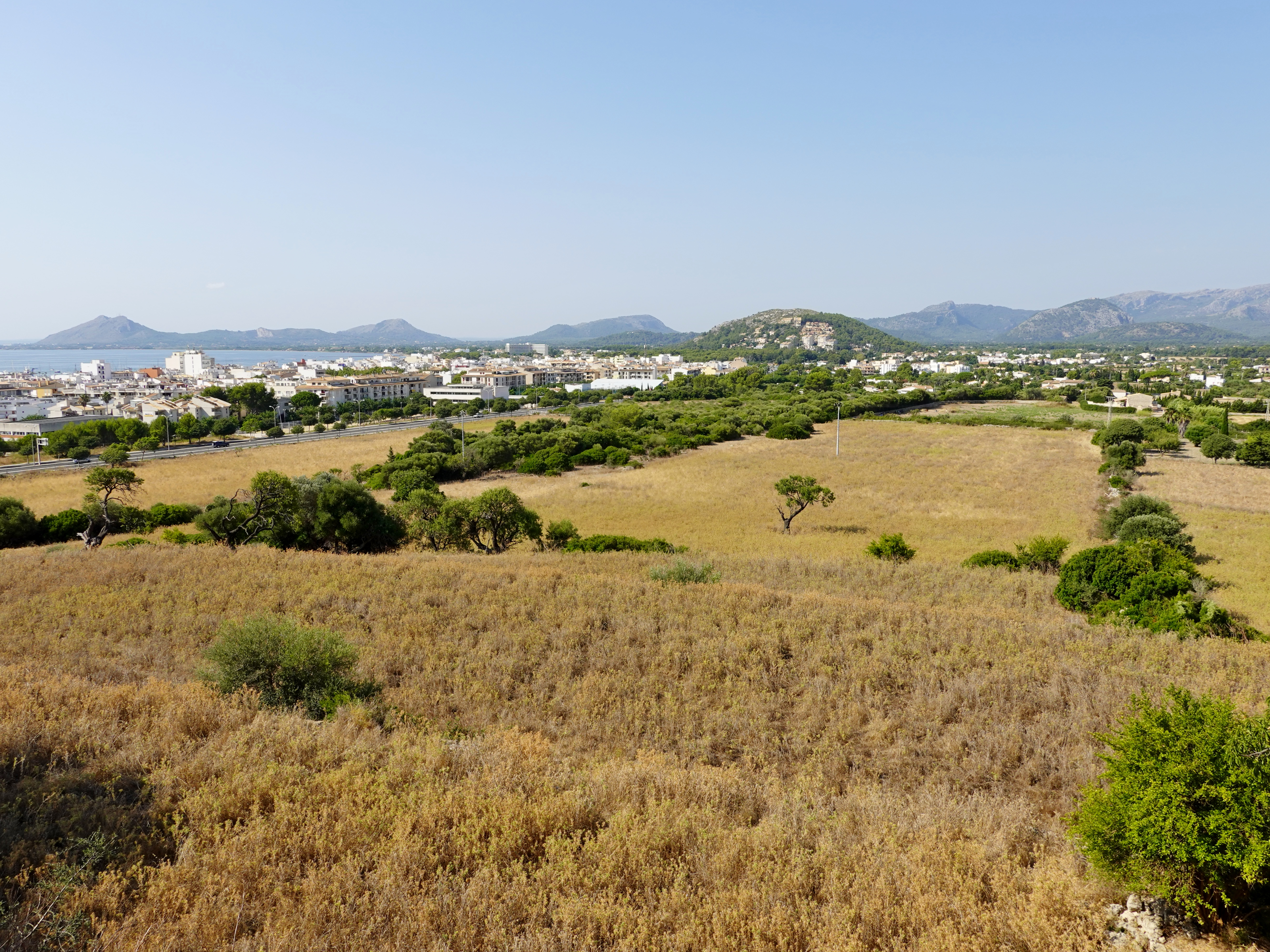 Fläche der ehemaligen römischen Siedlung Bocchoris bei Port de Pollença auf Mallorca, Spanien